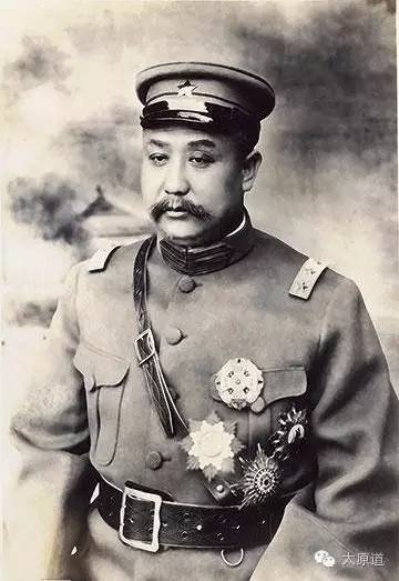 閻錫山, 字伯川 (1883 - 1960)